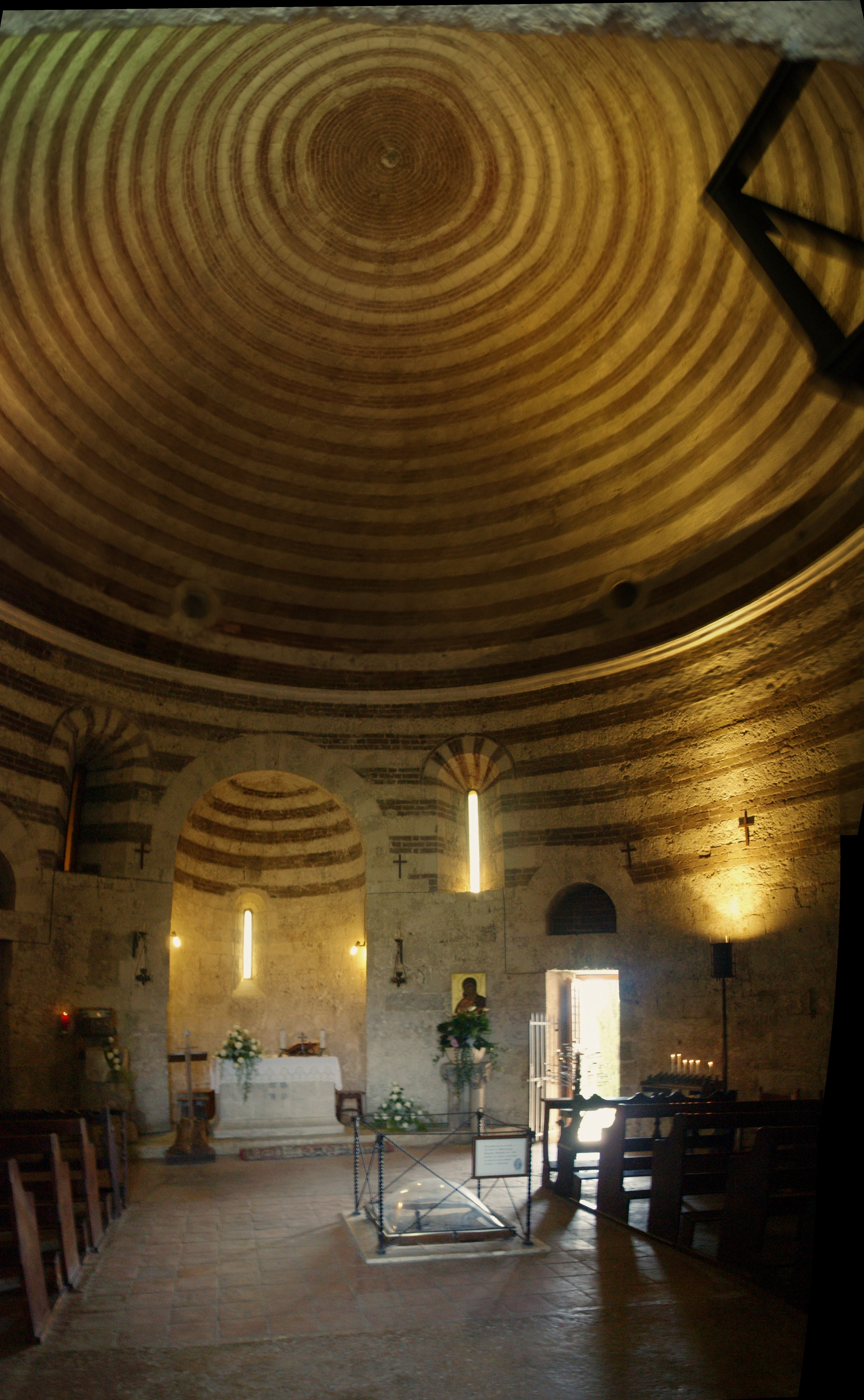 Rotonda di Montesiepi,spada nella roccia